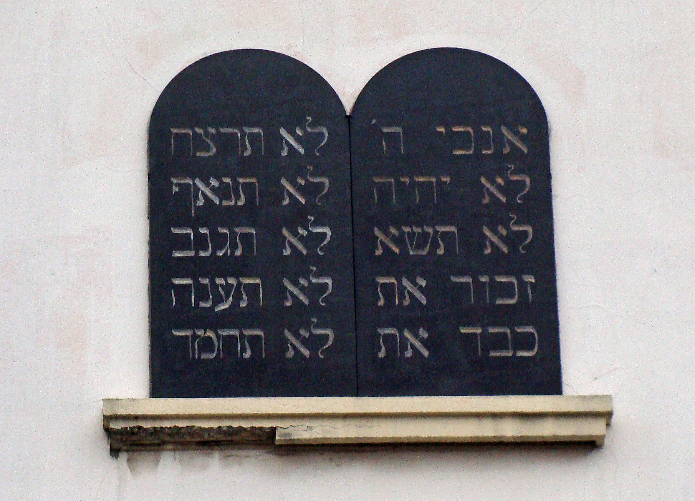 Tables de la Loi, façade de la ynagogue de Forbach, avenue Saint-Rémy, construite de 1835 à 1836.